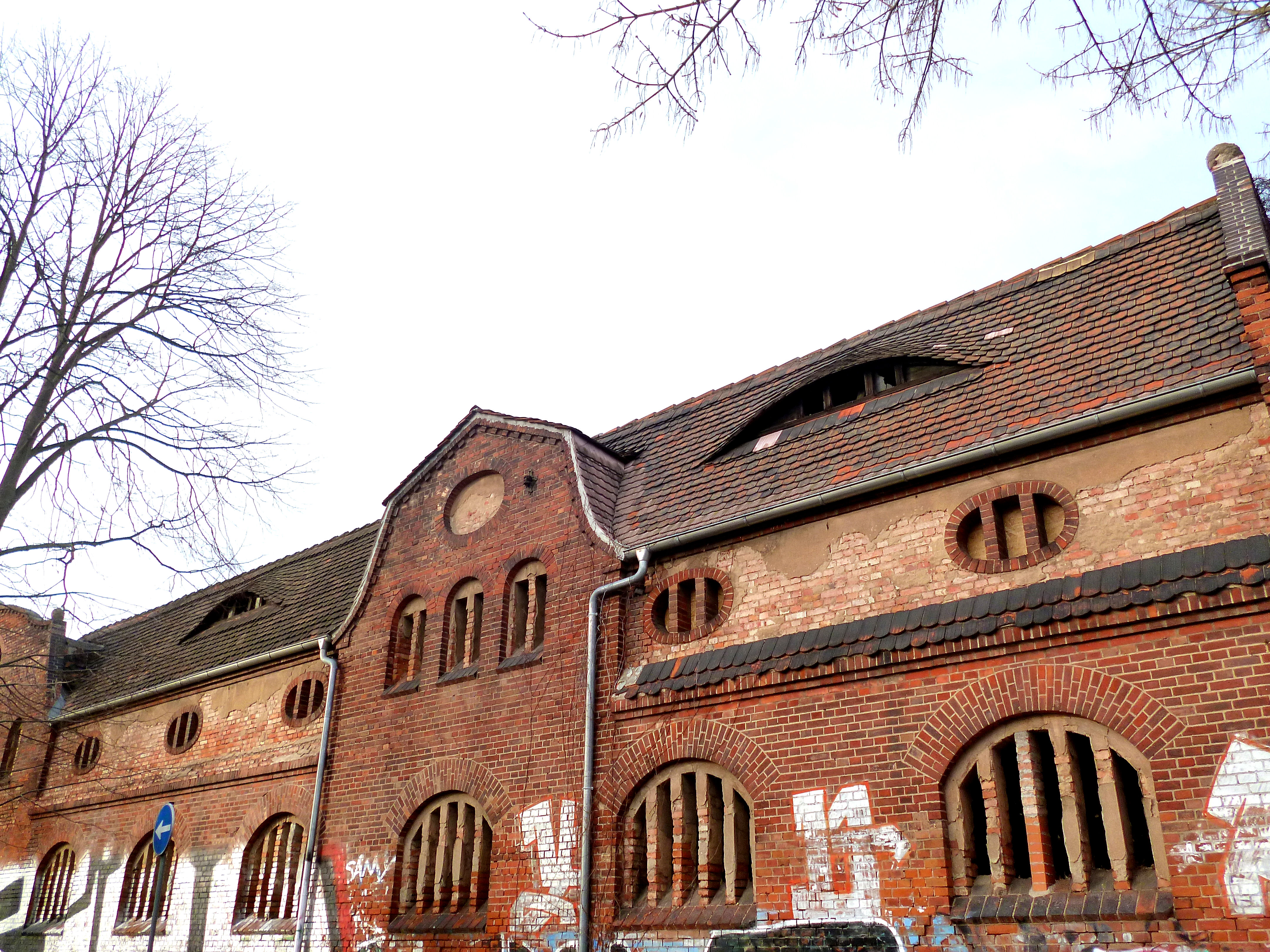 Mansfelder Straße 41, Halle (Saale), ehemalige Deparadesche Holzhandlung, erbaut Anfang des 20. Jahrhunderts